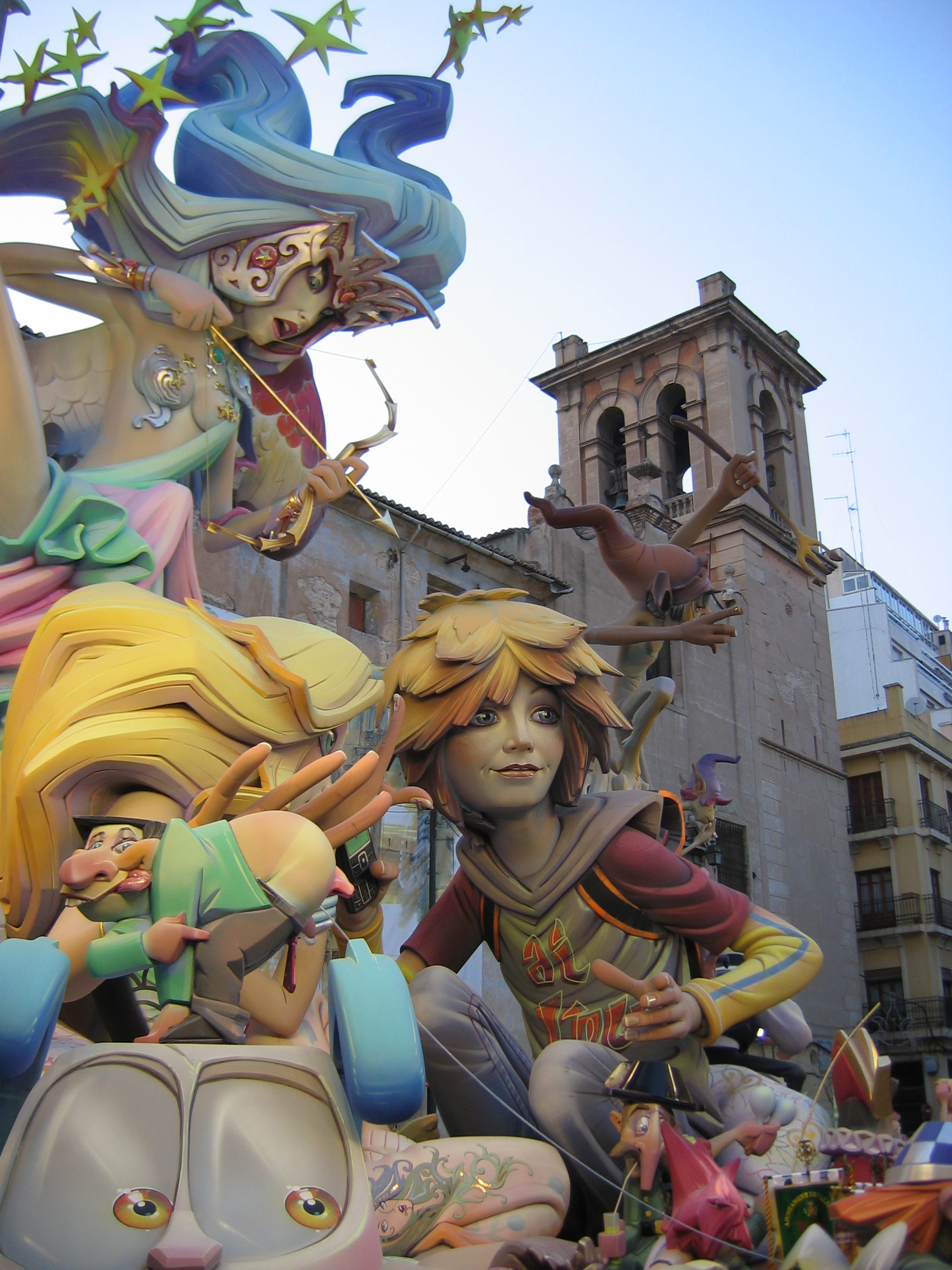 Falla del Pilar, Valencia. Marzo del 2007